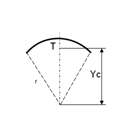 Težište kružnog luka